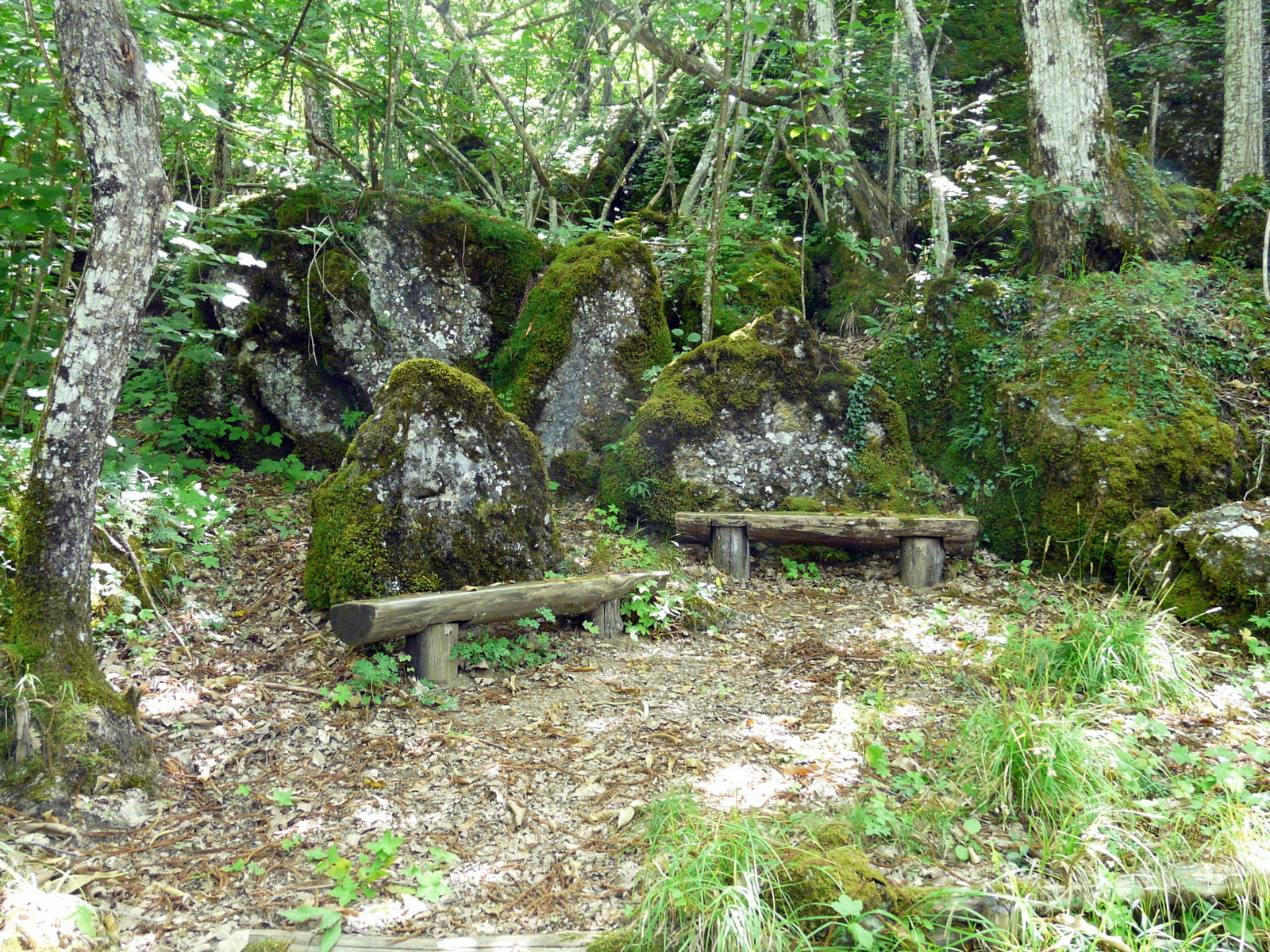 Il Bosco delle fate, Fontanigorda, Liguria, Italia